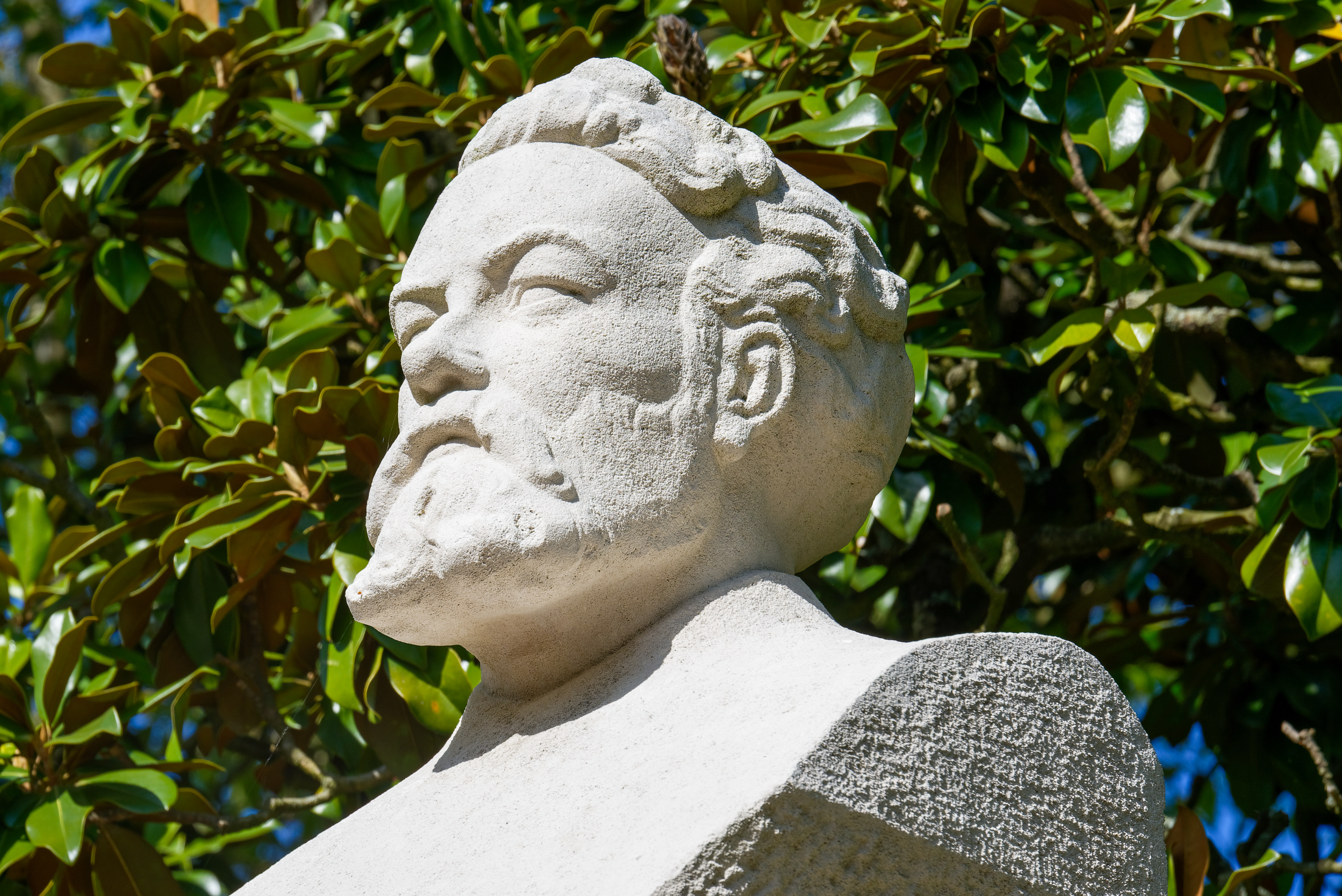 Buste de Jules-Verne, sur son monument au jardin des plantes. (Nantes, Loire-Atlantique, Pays de la Loire, France)